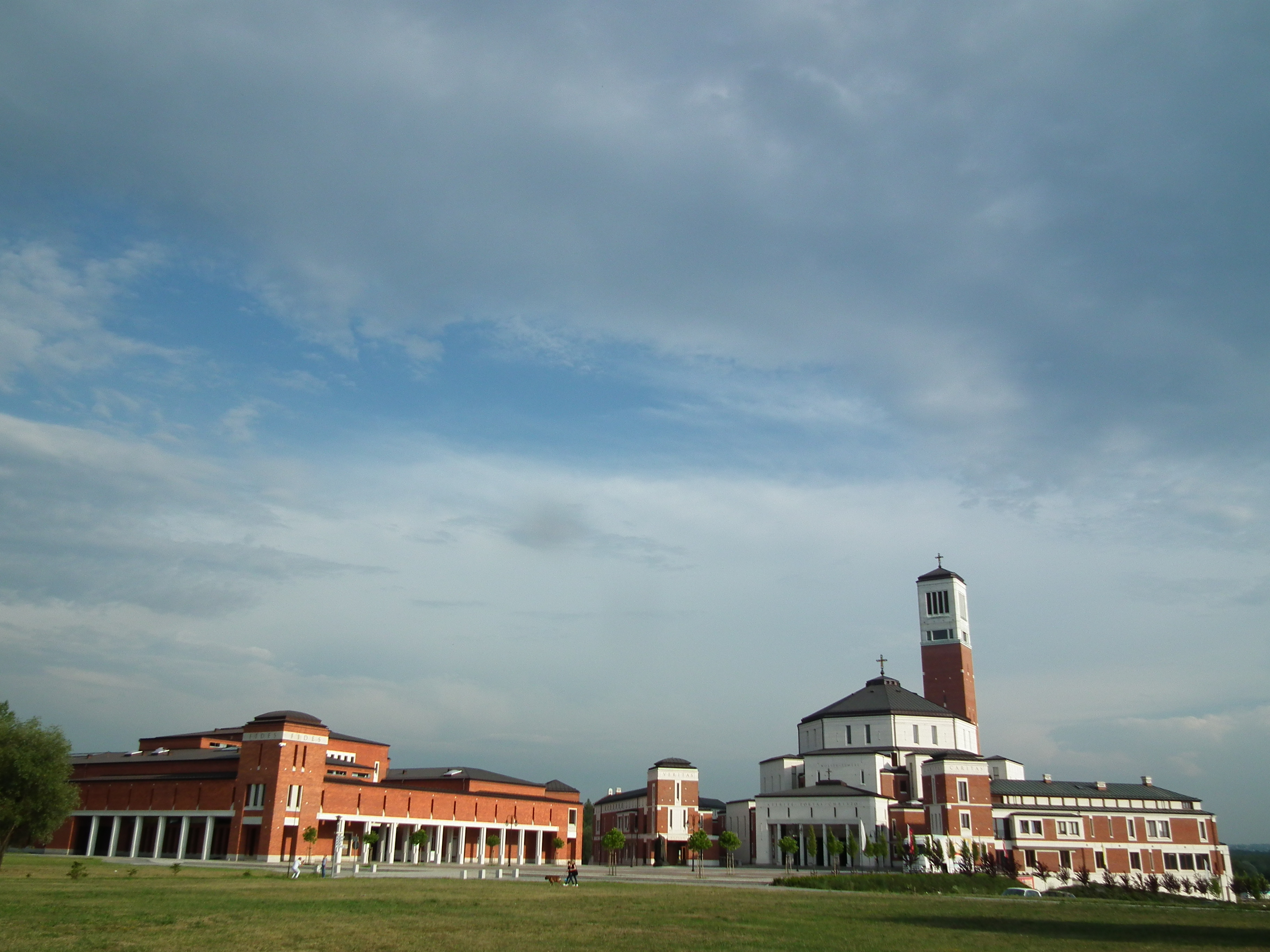 Centrum Jana Pawłą II w Krakowie.